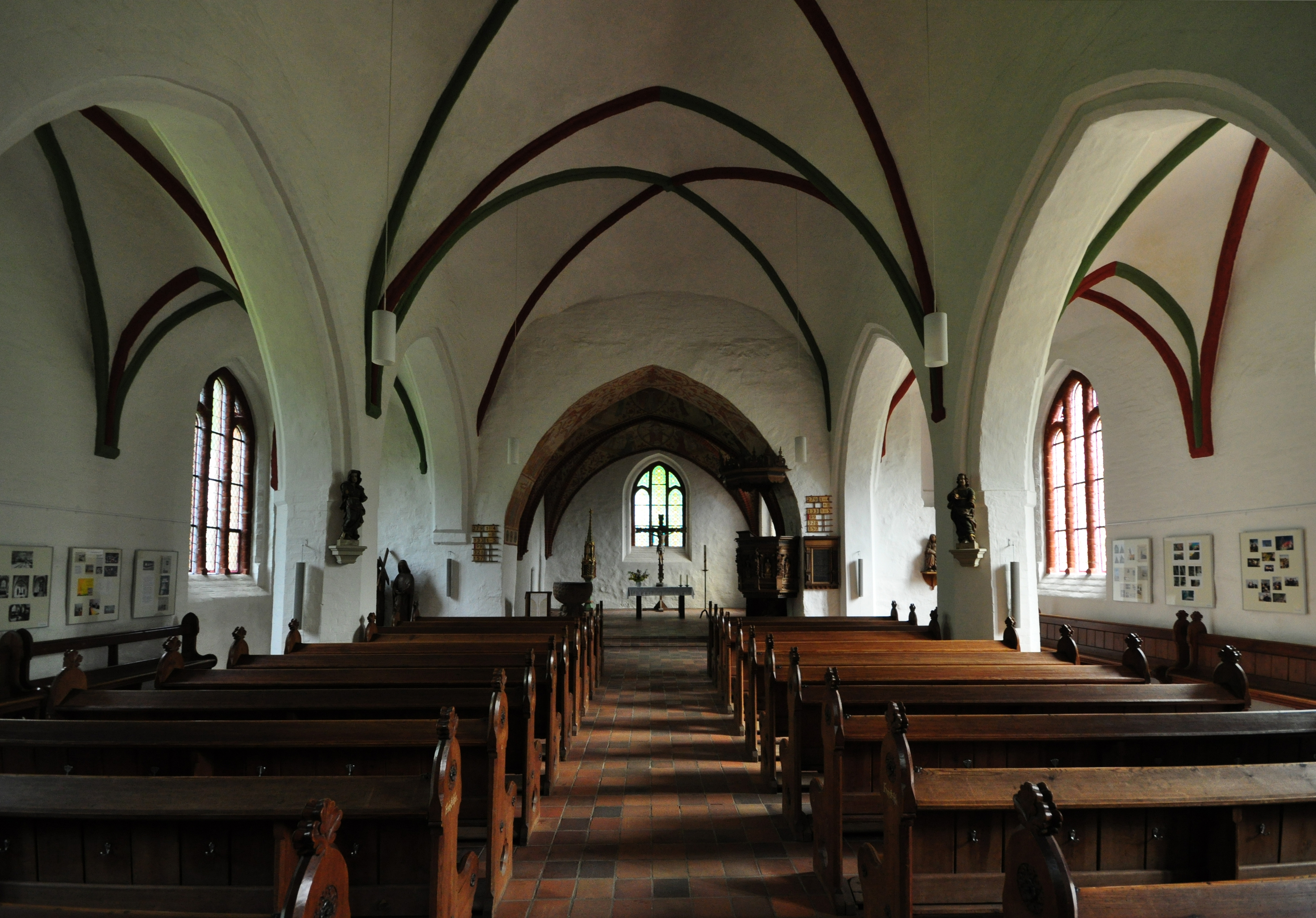 interior view of church Lichtenhagen